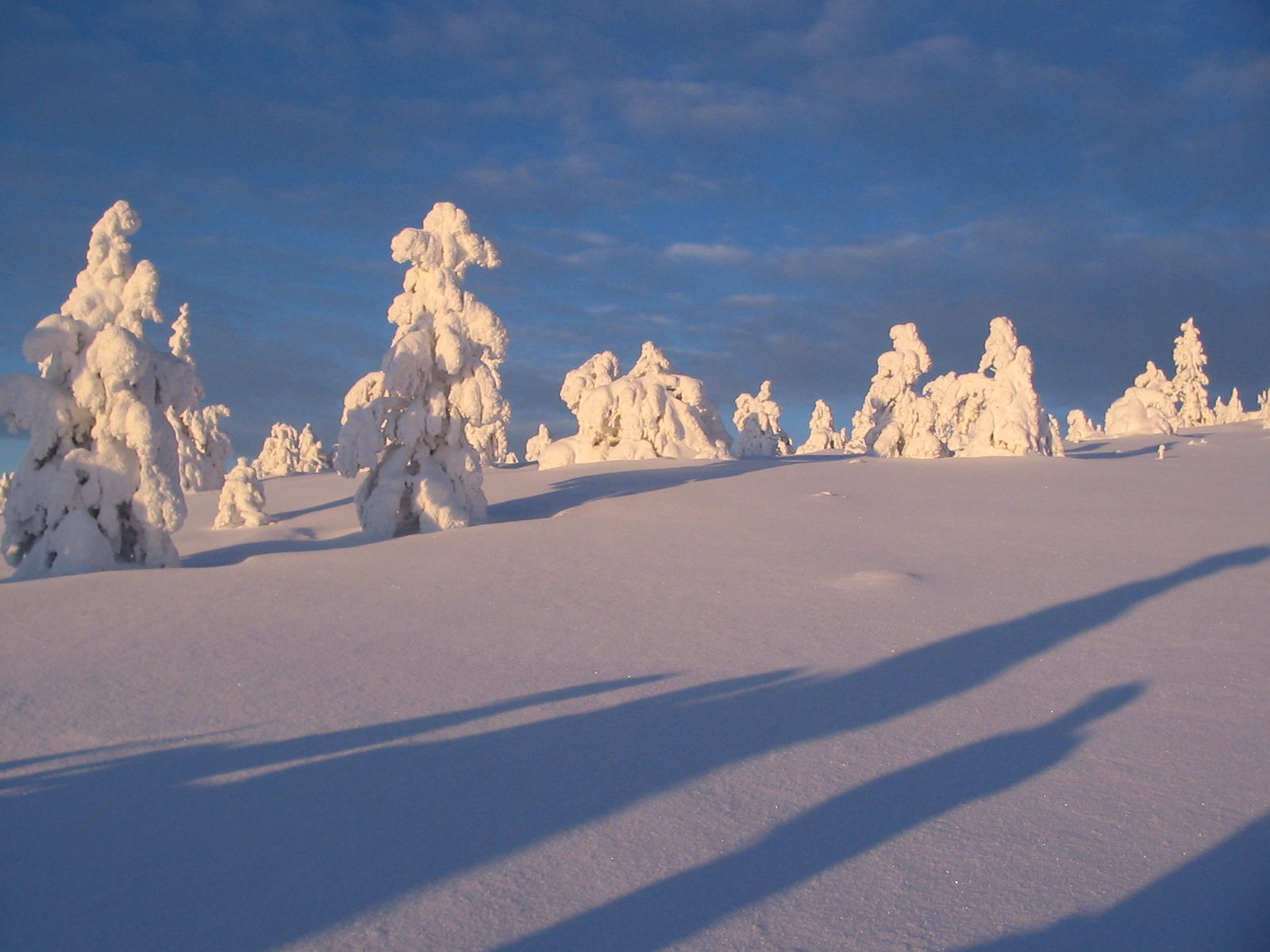 Levi, Kittila - Finland